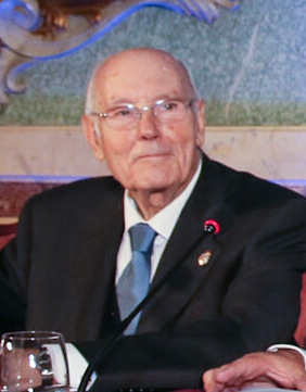 MADRID 12/11/2015. El presidente de Castilla-La Mancha, Emiliano García-Page, asiste a las 19:00 horas al acto de la XXI edición del Premio Pelayo a juristas de reconocido prestigio, que este año ha recaído en Fernando Ledesma Bartret, en el Casino de Madrid (foto Ignacio Lopez//JCCM)